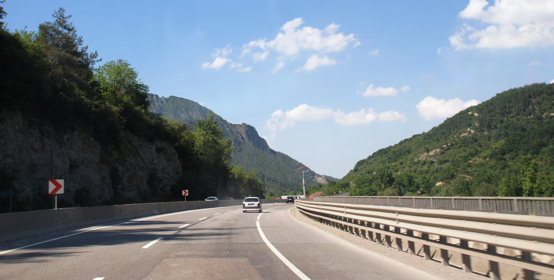 Şerefiye köyü yakınlarında Geyve Boğazı.